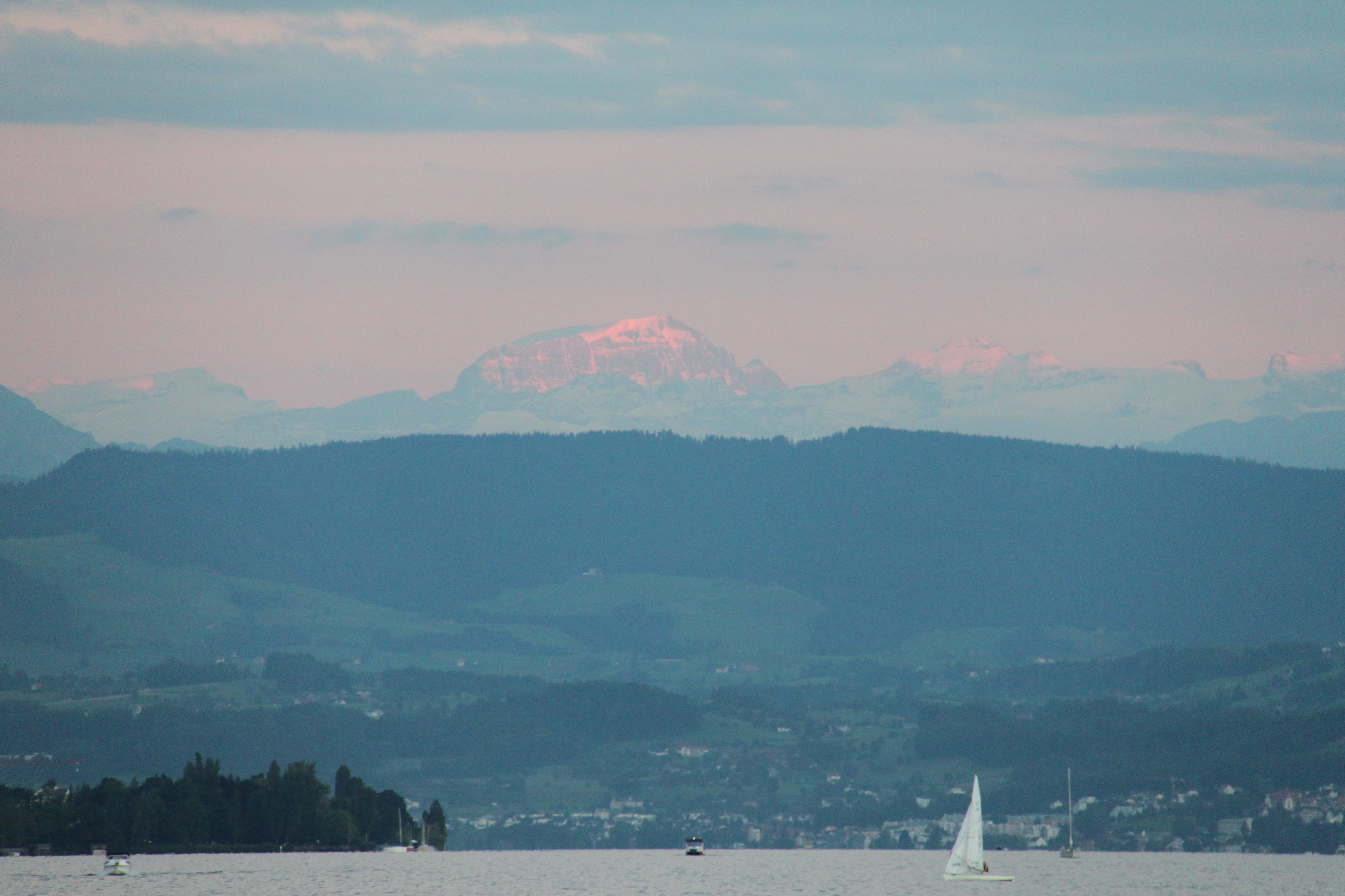 Tödi von Zürich aus fotografiert